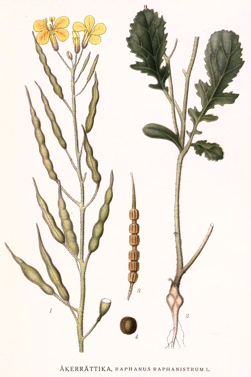 Original Description Åkerrättika, Raphanus raphanistrum L.